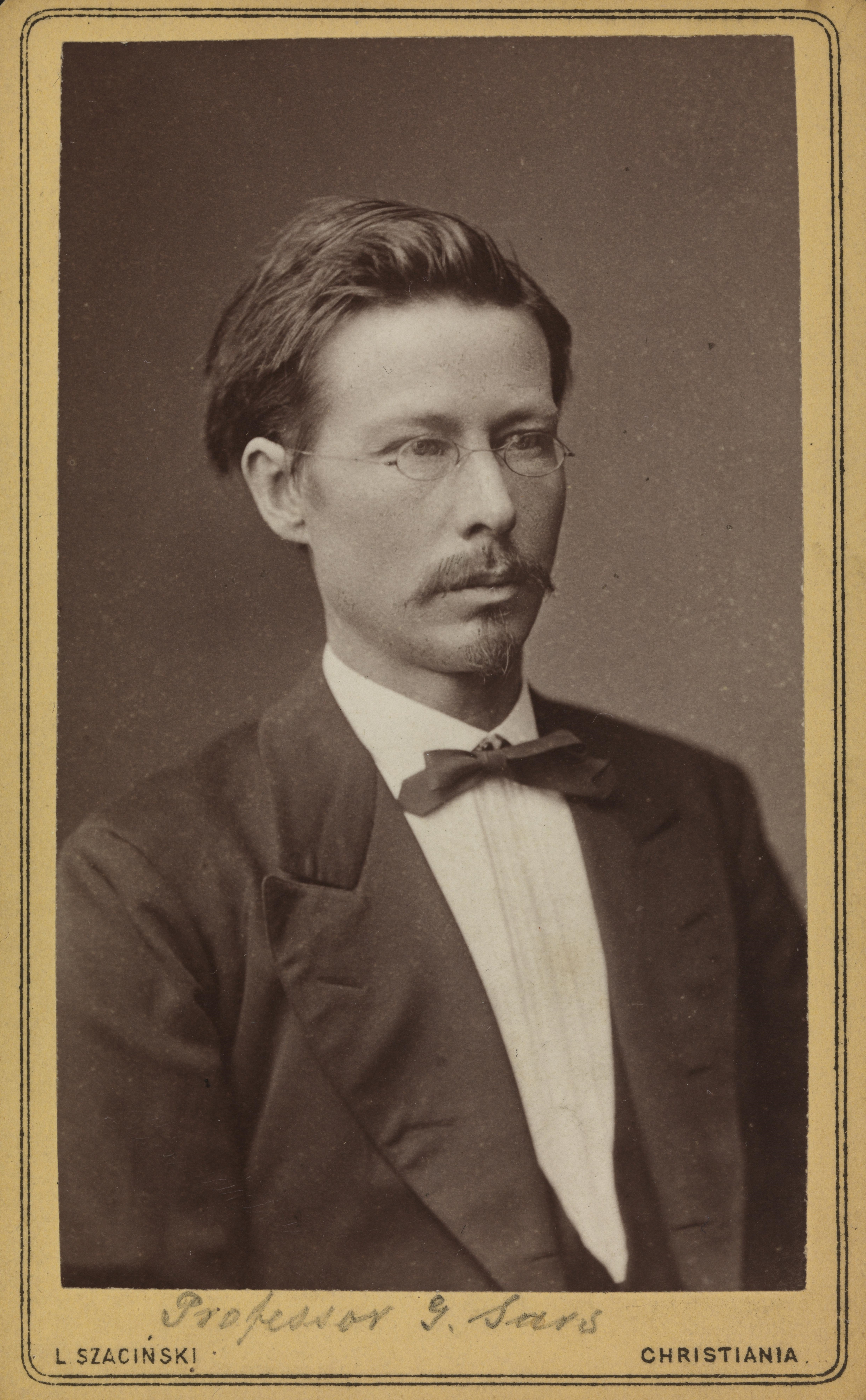 Bildet er hentet fra Nasjonalbibliotekets bildesamling Depicted person: Sars, Georg Ossian